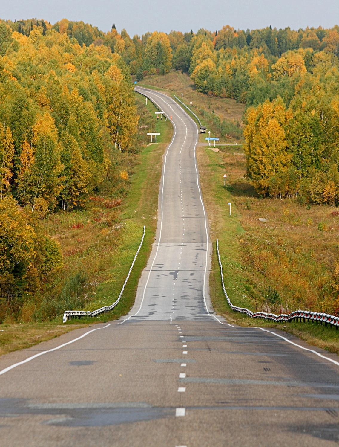 Трасса Р398